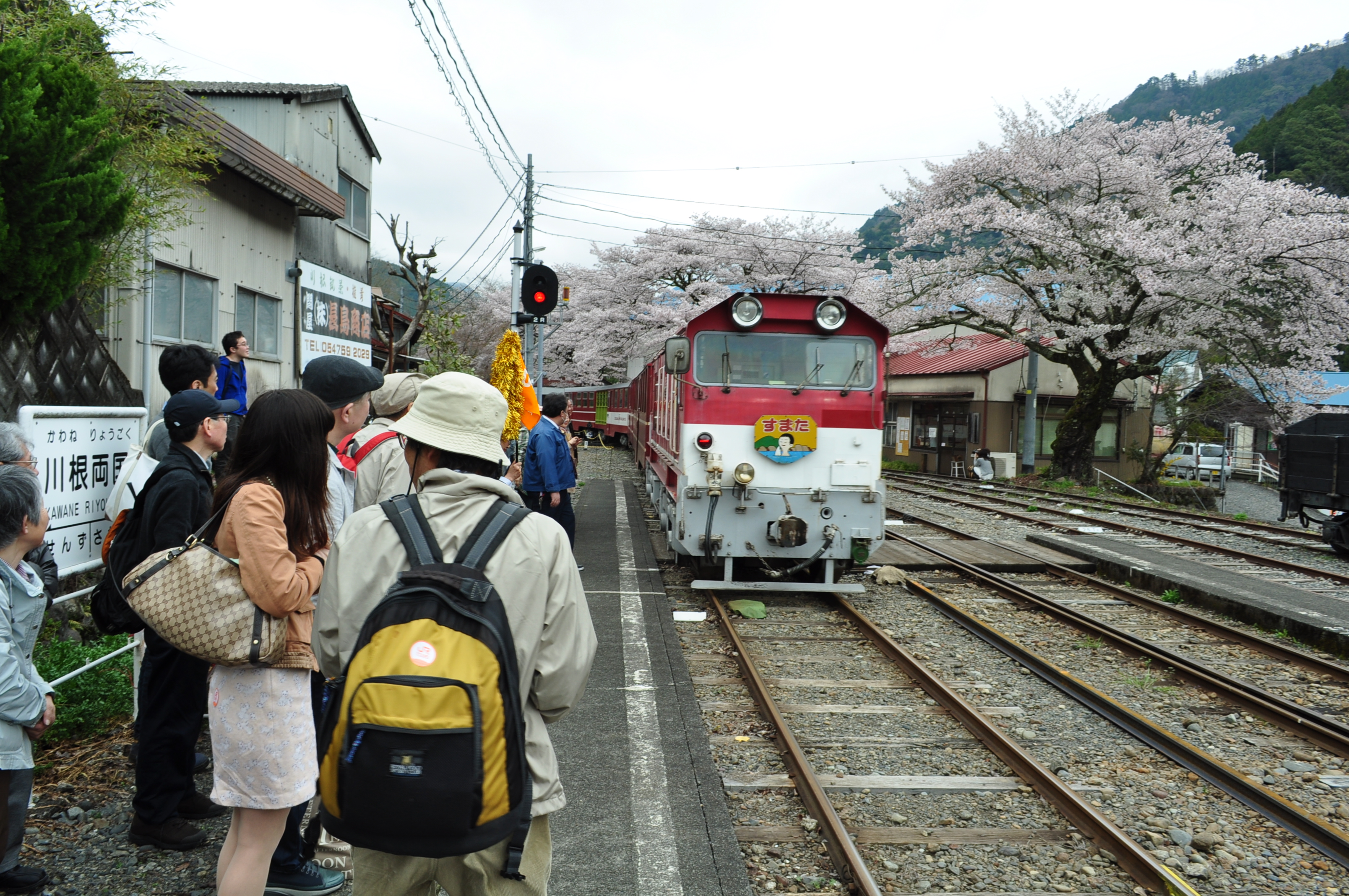 川根両国駅 Nikon D5000